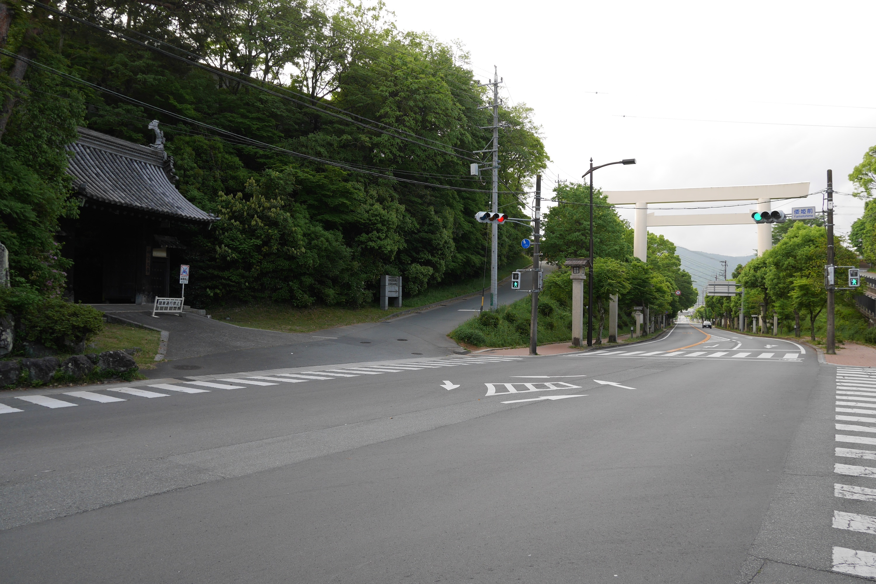 三重県伊勢市・御幸道路（三重県道37号線）上にある神宮文庫の門（通称「黒門」）と大鳥居